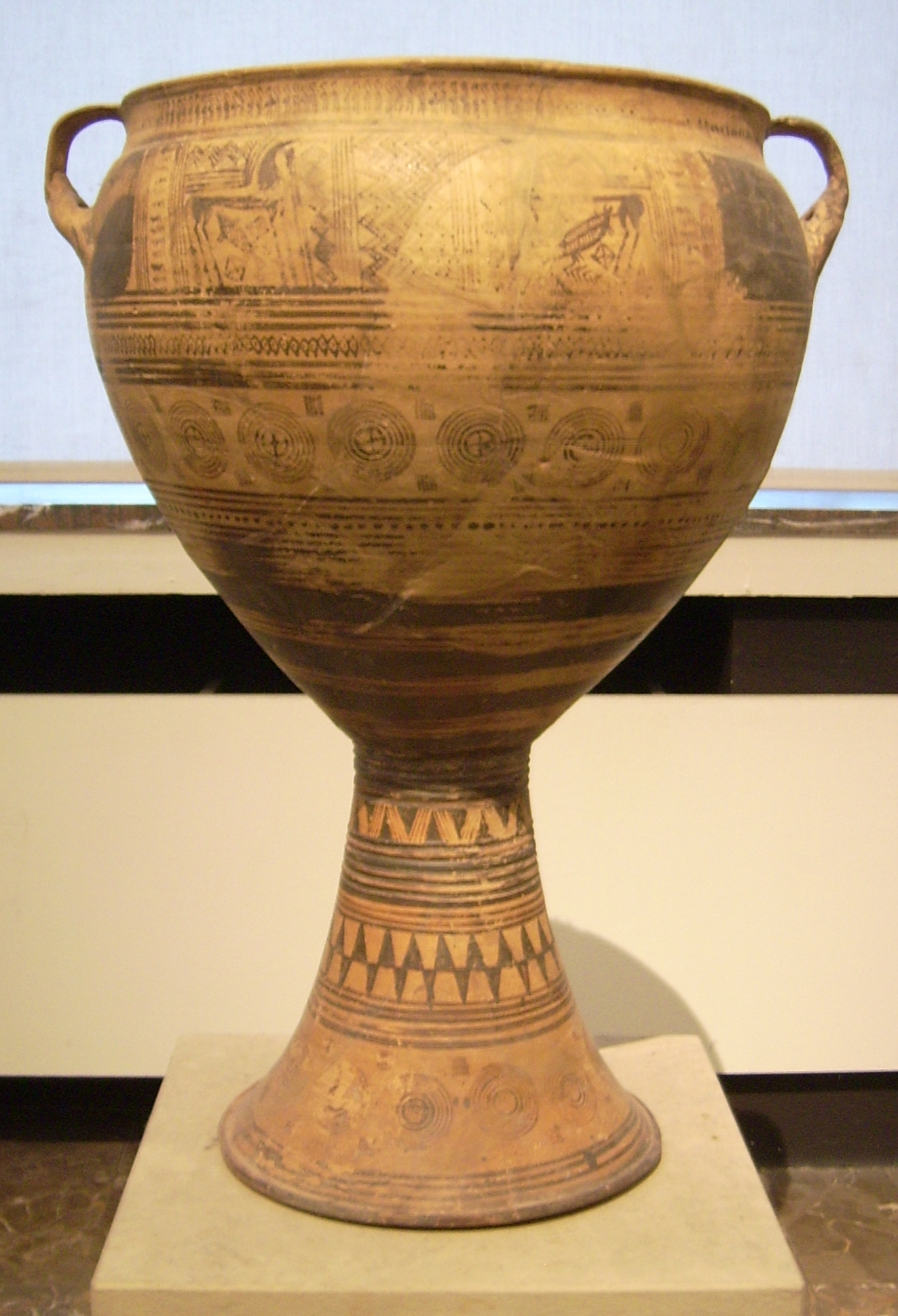 Spätgeometrischer Bügelhenkelkrater, aus einer argivischen Werkstatt; auf der Gefäßschulter Felder mit Pferdedarstellungen, um 730 v. Chr., gefunden auf Melos, Antikensammlung im Alten Museum Berlin